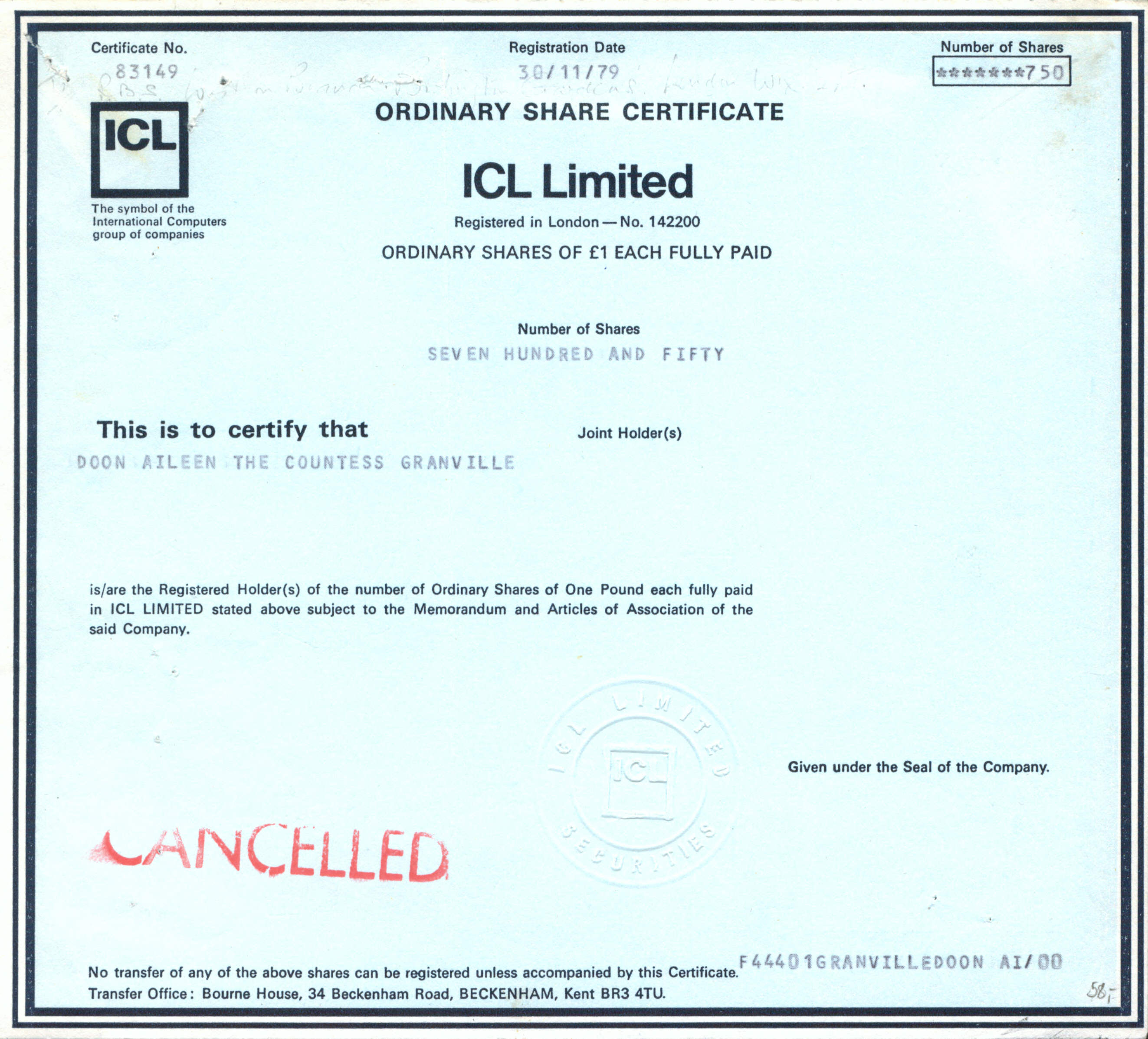 Namensaktie Nr.83149 der ICL Limited vom 30.11.1979 über 750 Shares à 1 Pfund